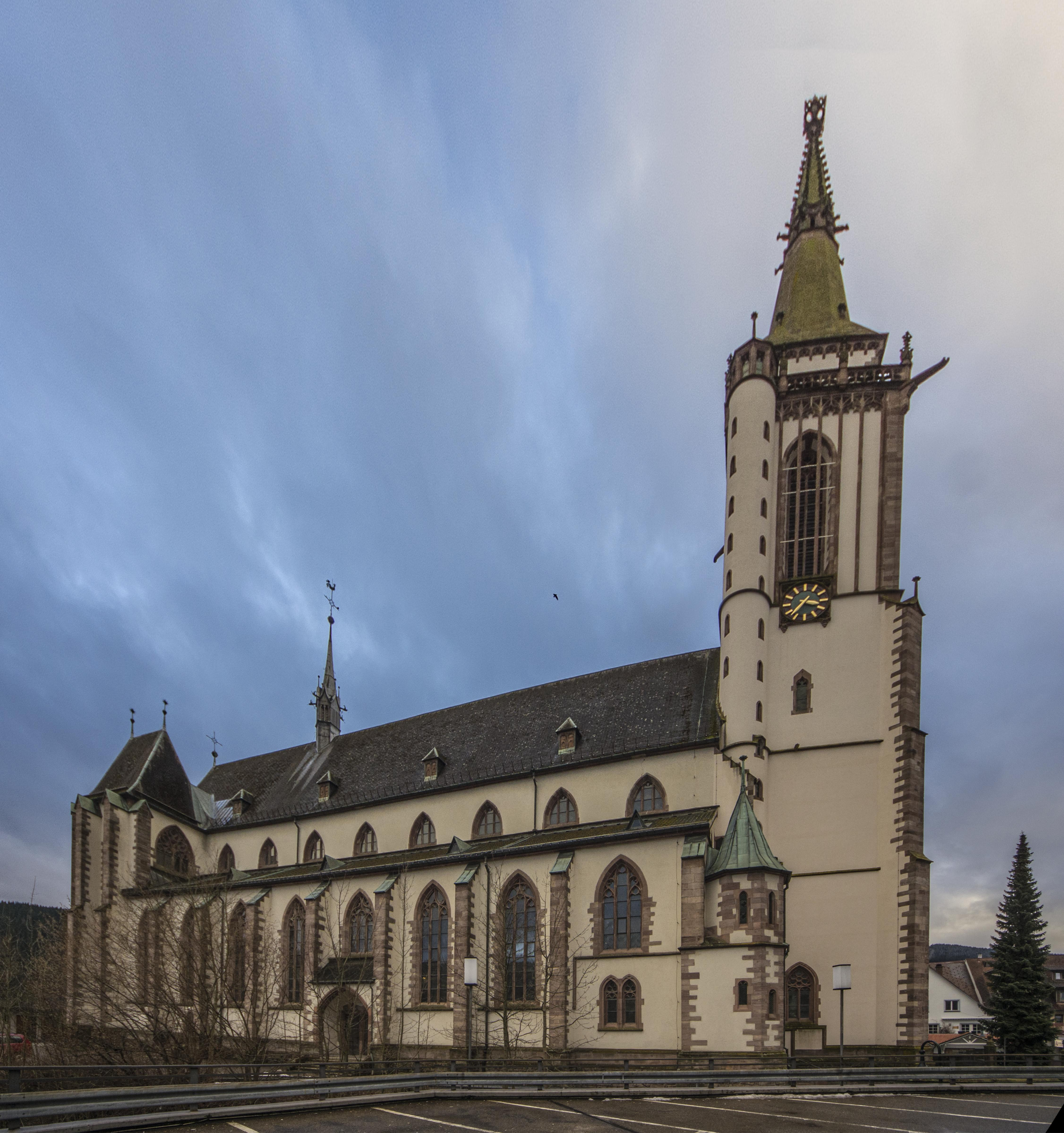 Bilder entlang der B31